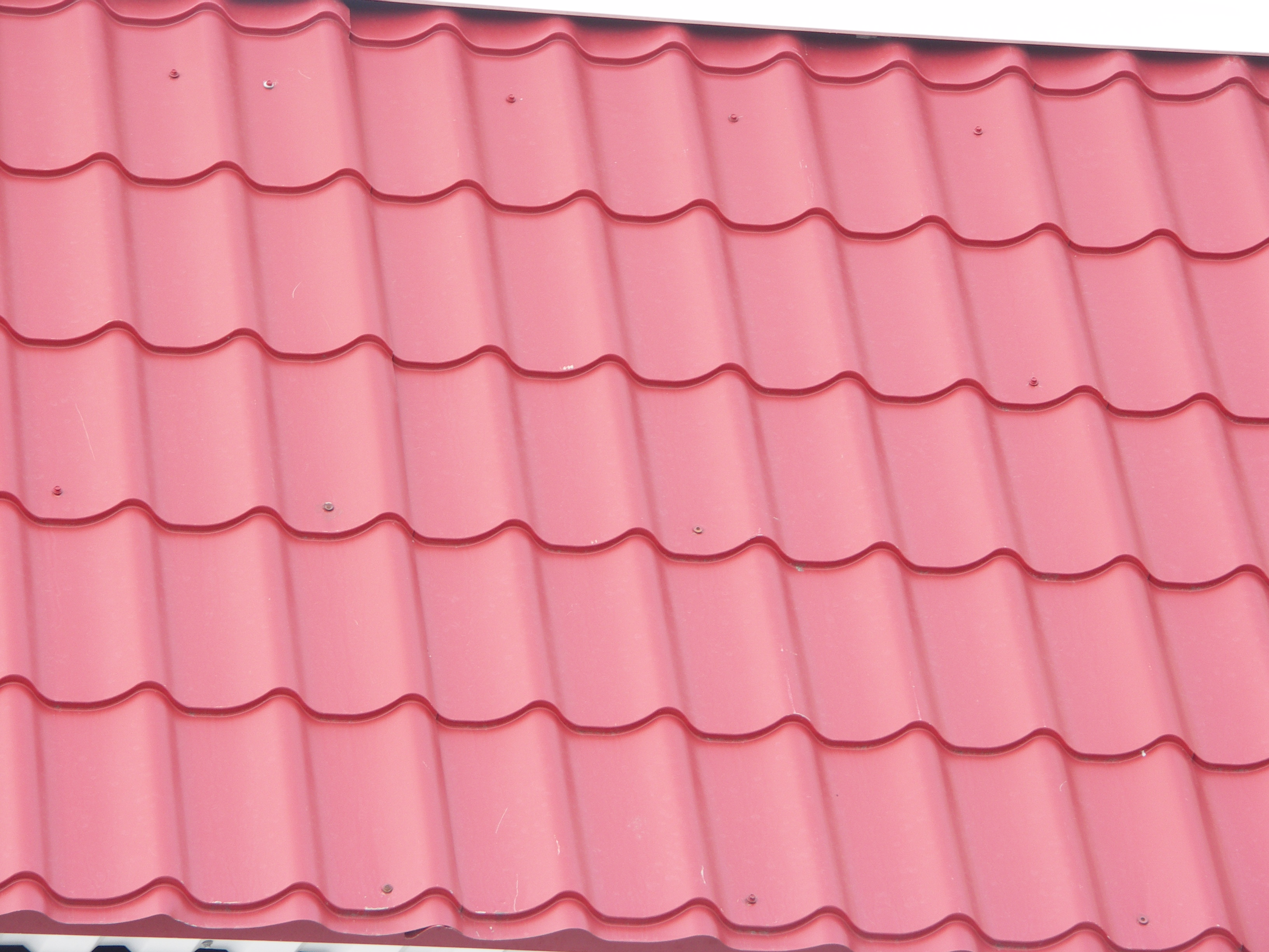 Металлочерепица коричневого цвета